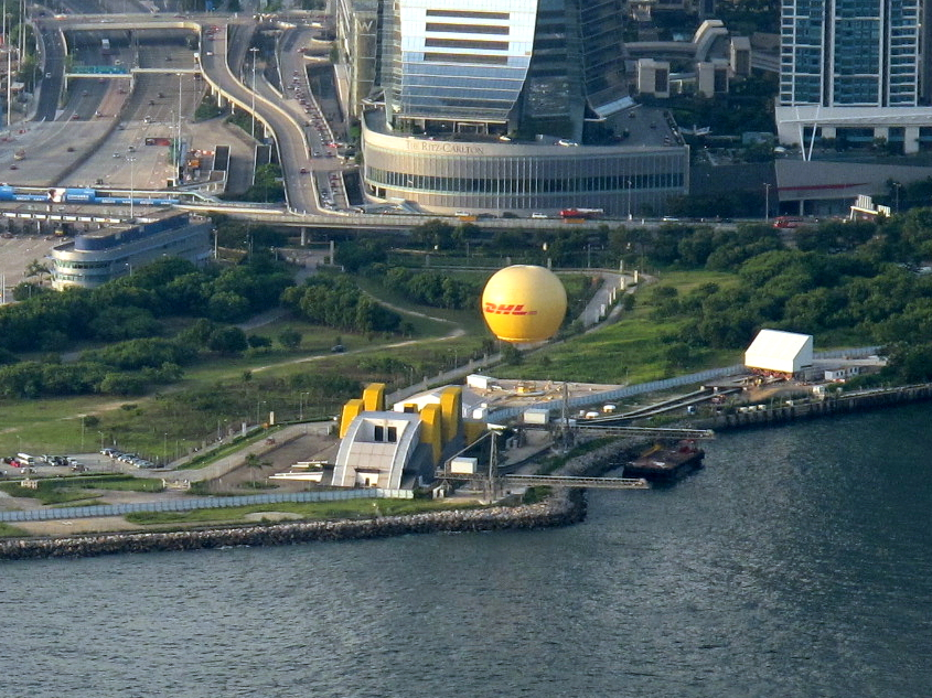 DHL Balloon Hong Kong